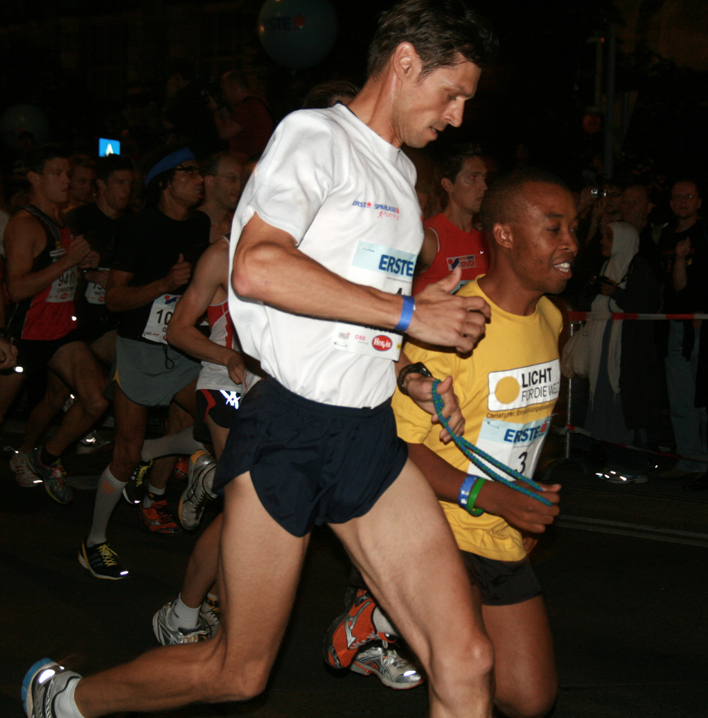 Henry Wanyoike und Michael Buchleitner (Vienna Night Run 2009, Wien)